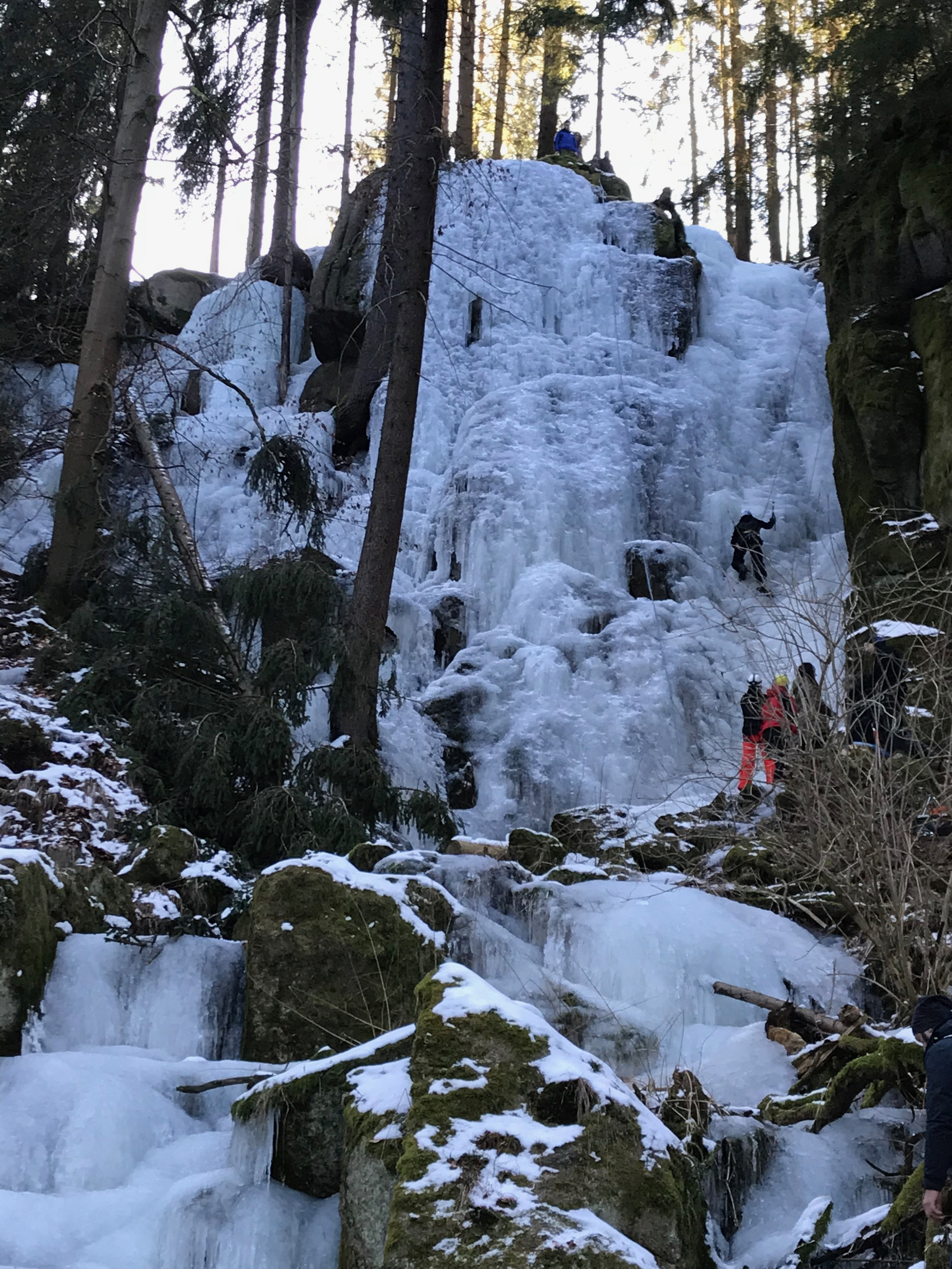 Eiskletterer am gefrorenen Wasserfall (2018)